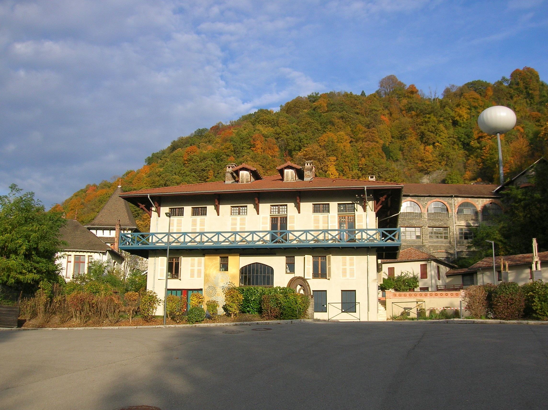 Maison Bergès. Lancey, Villard-Bonnot, Isère, France.